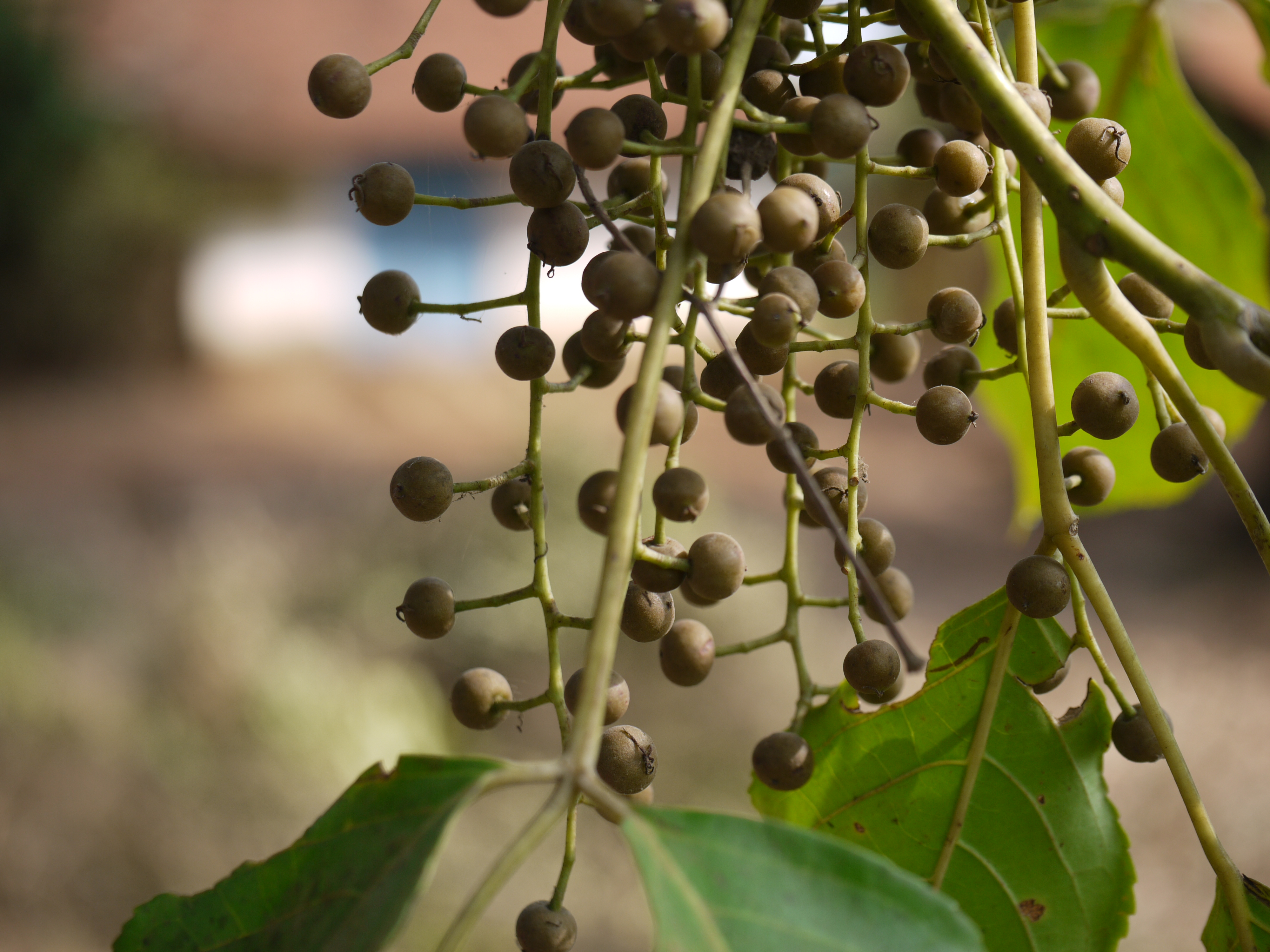 Bischofia javanica